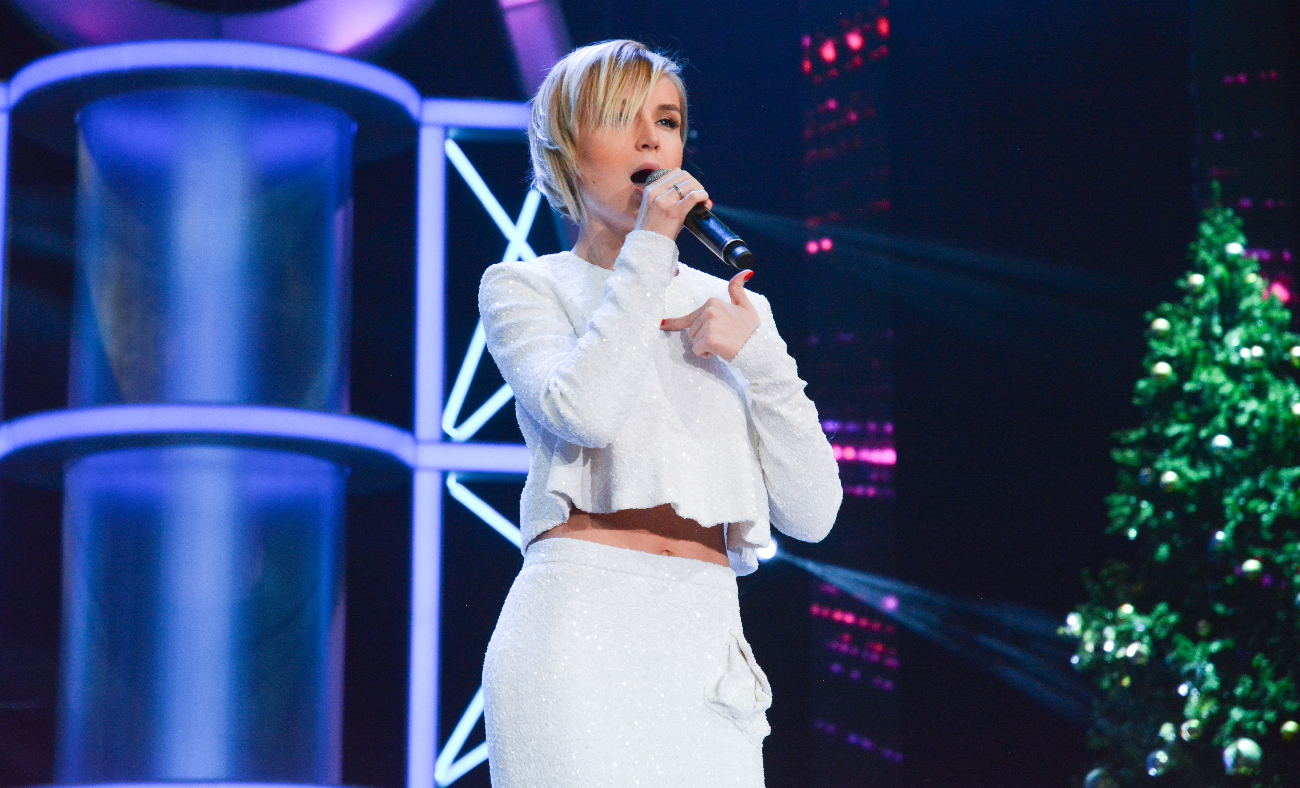 Полина Гагарина на Рождественской Песенке года 2015